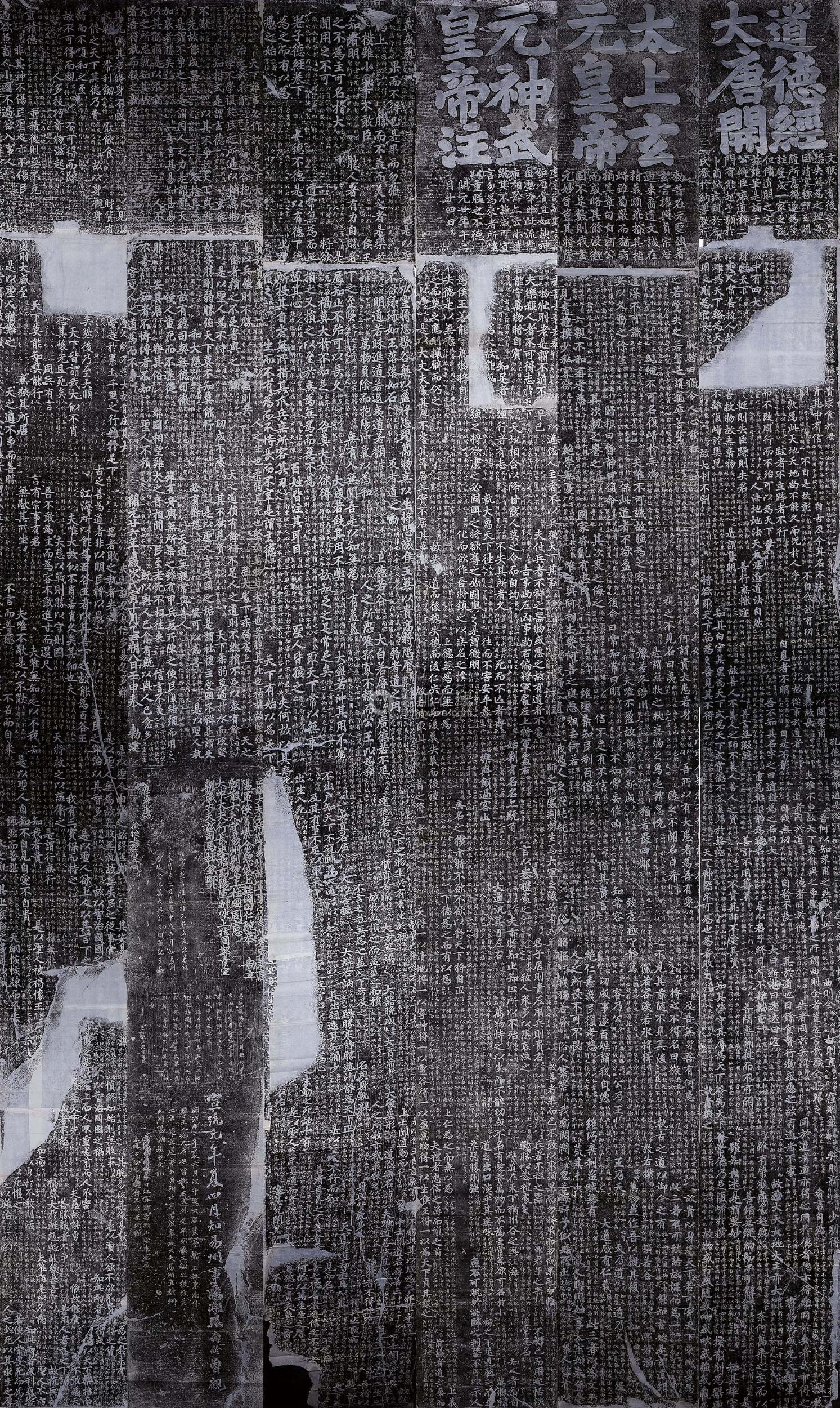 易县道德经幢拓片（部分）。经幢有八面，此图示出六面，且每面边缘被裁切。 注意：源网站声称此图为河南省鹿邑县太清宫景区太极殿前神道东侧《唐开元神武皇帝道德经注碑》的拓片。这是不对的。拓片的各个特征（内容、题记、缺损）均与易县道德经幢相符。